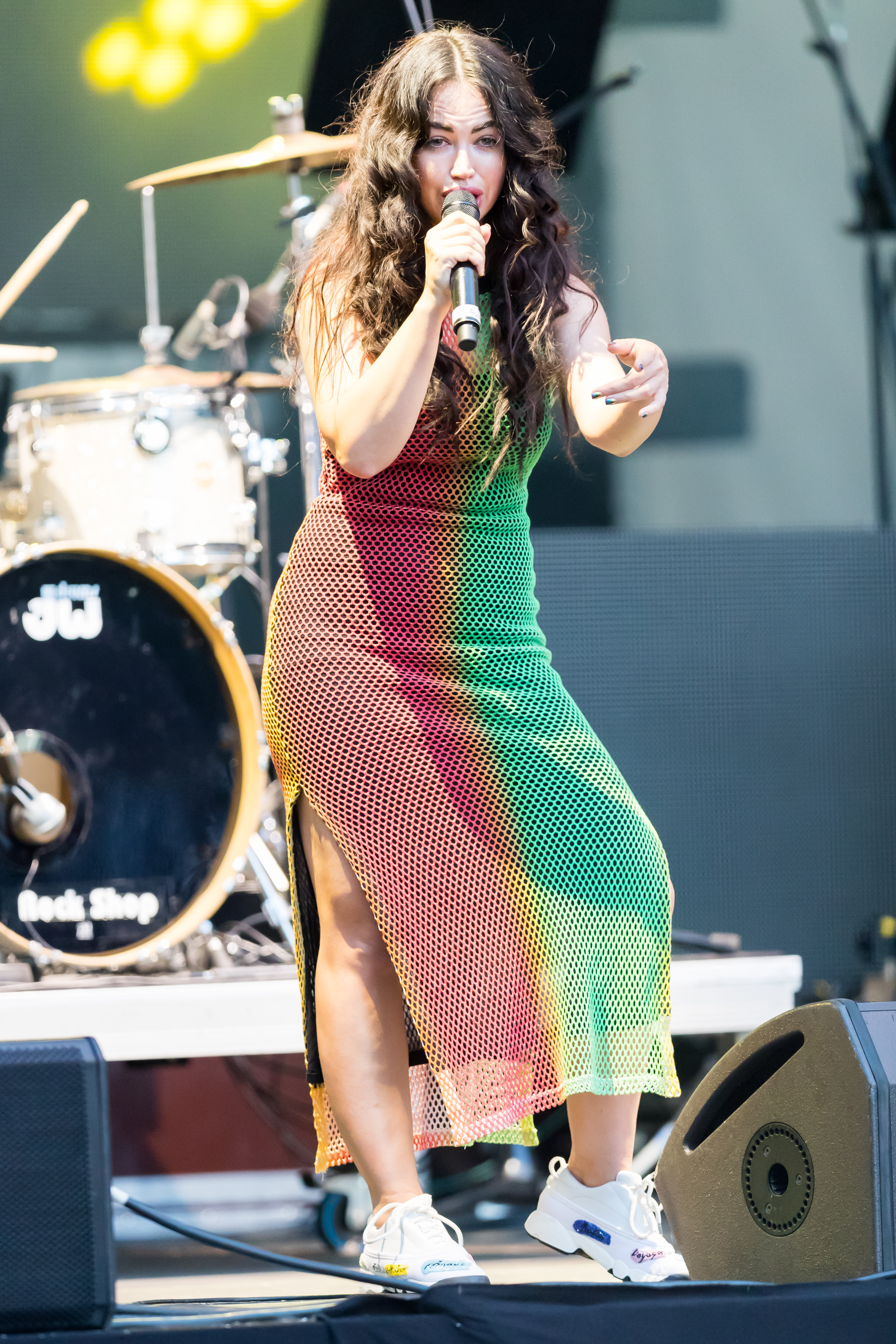 Aura Dione during Stadtfest Ludwigshafen at Berliner Platz, Ludwigshafen, Rheinland-Pfalz, Germany on 2017-06-24, Photo: Sven Mandel